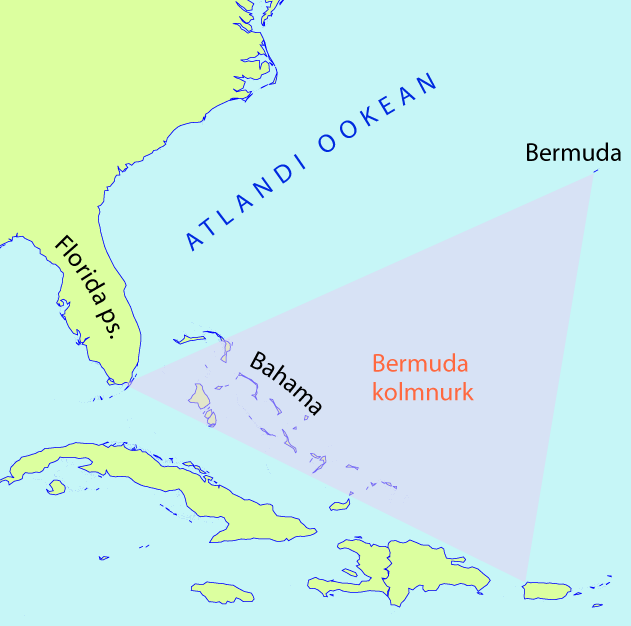 Bermuda kolmnurk